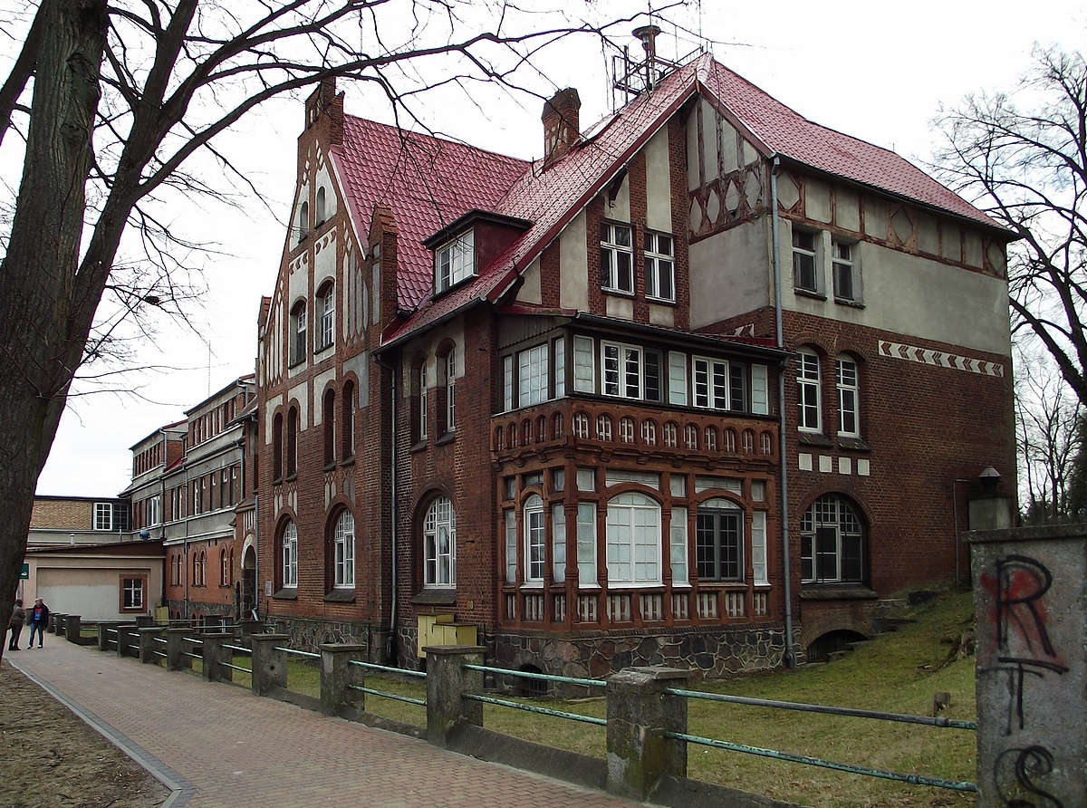 Wałcz, szpital miejski, 1853, 1894, 1930